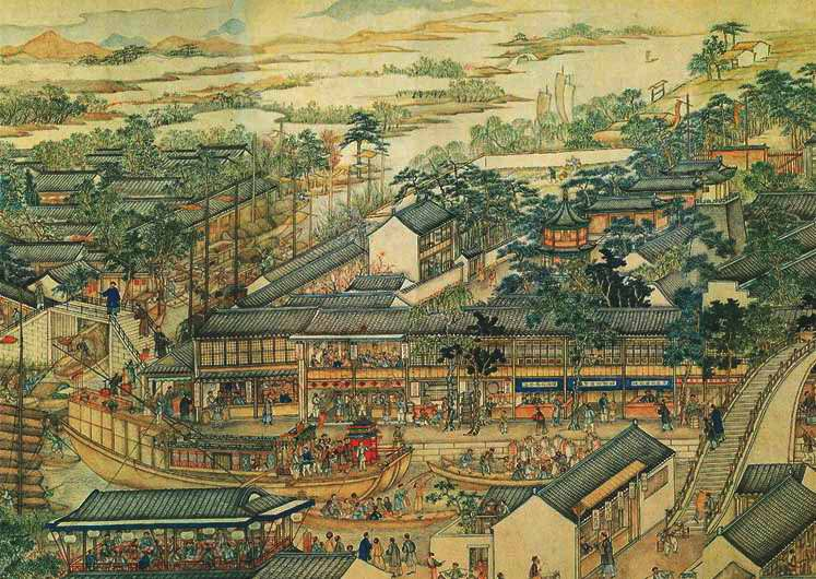 中文（台灣）: 姑蘇繁華圖（局部）